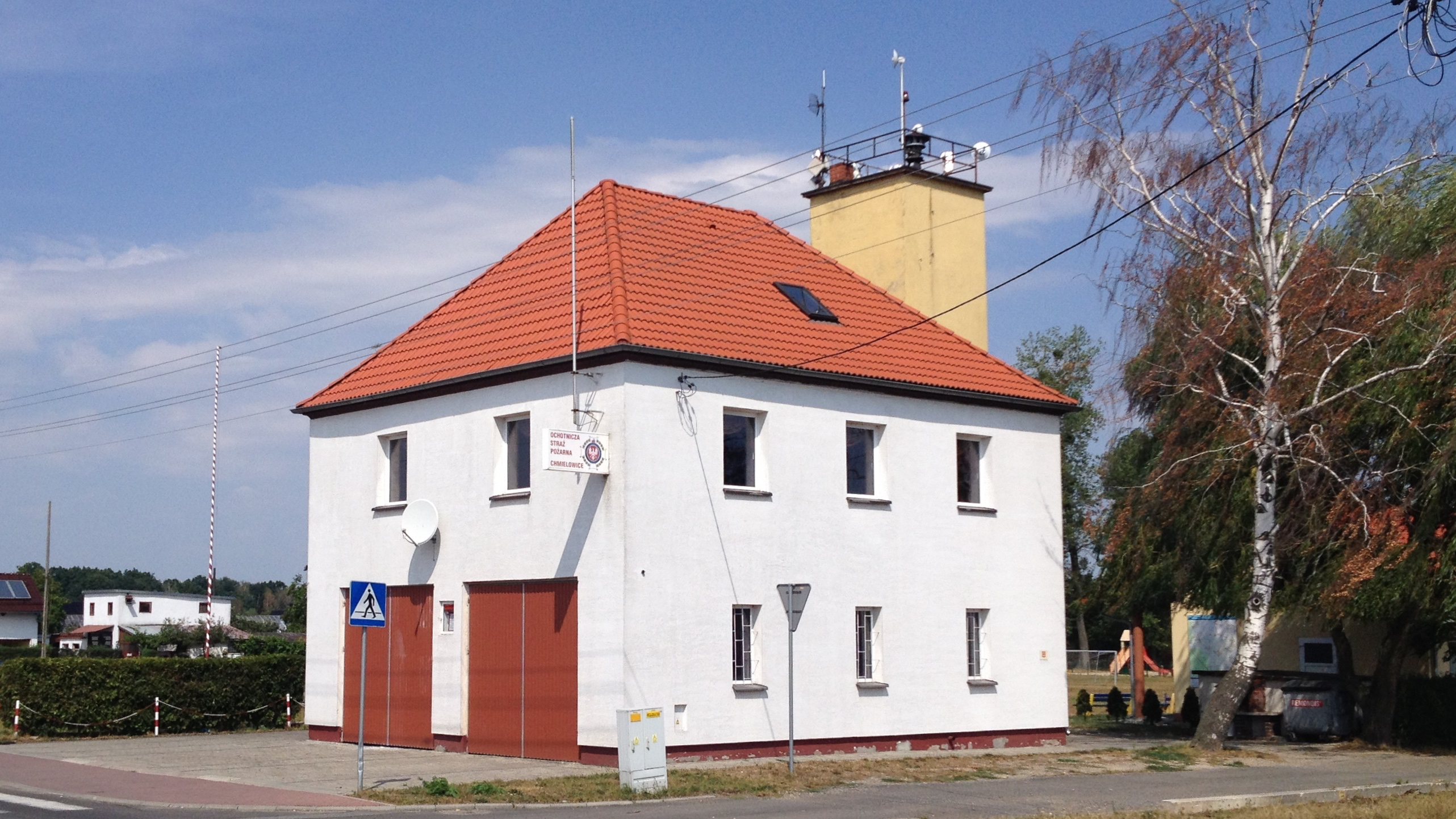 Remiza Ochotniczej Straży Pożarnej w Opolu Chmielowicach, przy ul. Cmentarnej